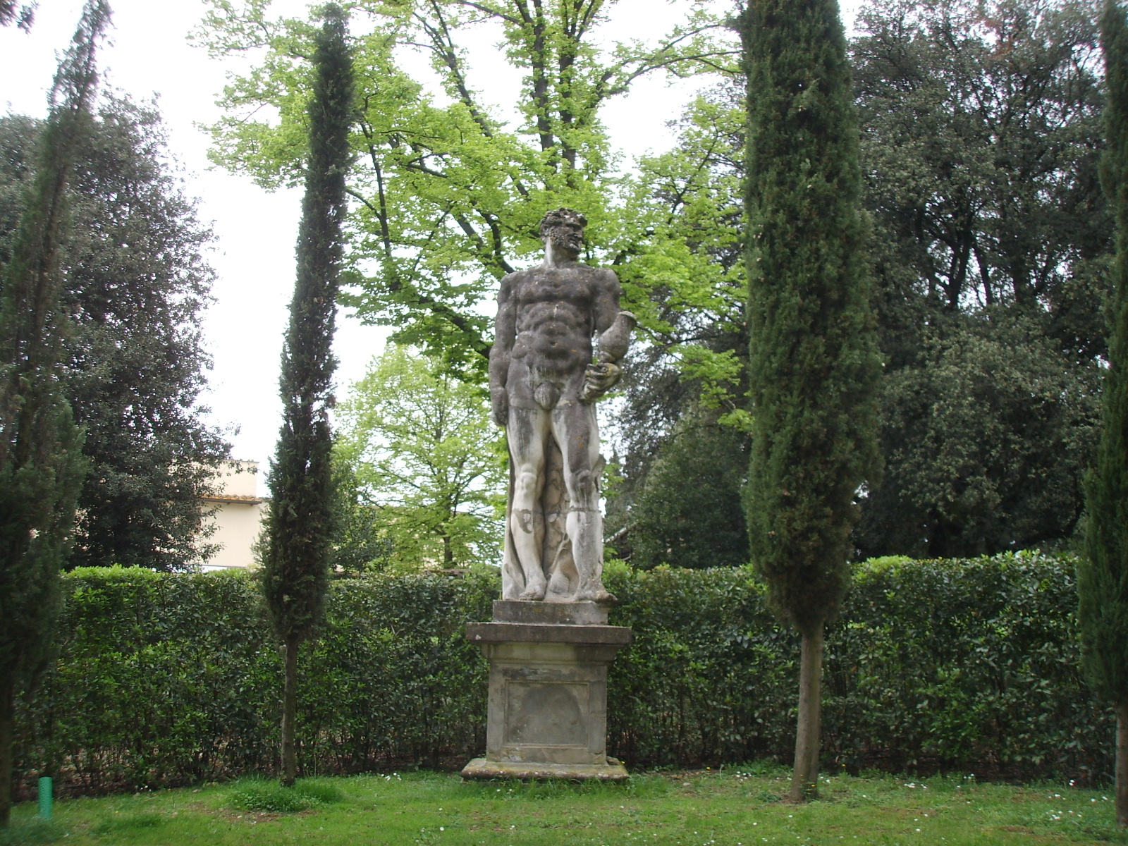 Villa la pietra, giardino est, colosso 0